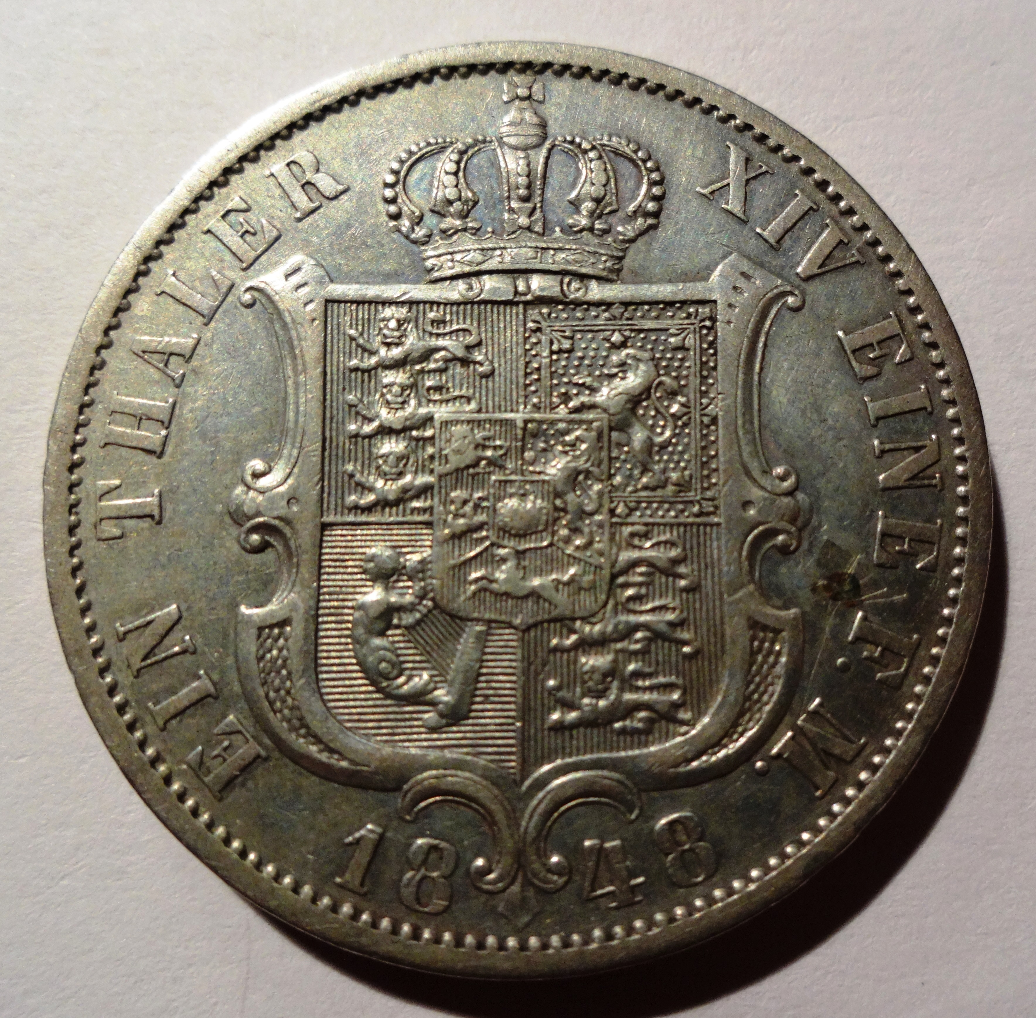 "Angsttaler", Königreich Hannover, Wertseite Welter 3142.